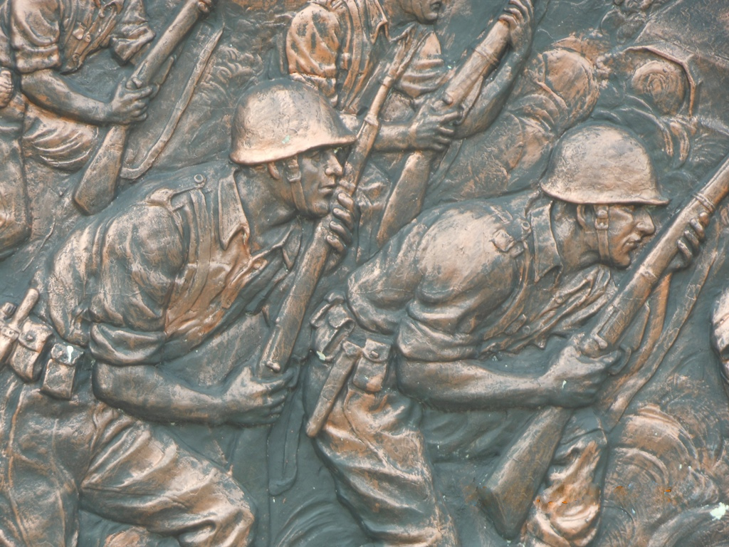 Confrontatie Nederlandse KNIL en Indonesische TRI monument bij een Militaire Begraafplaats in Palembang. Foto 2013 M.B. ter Borg (Detail KNIL militairen)